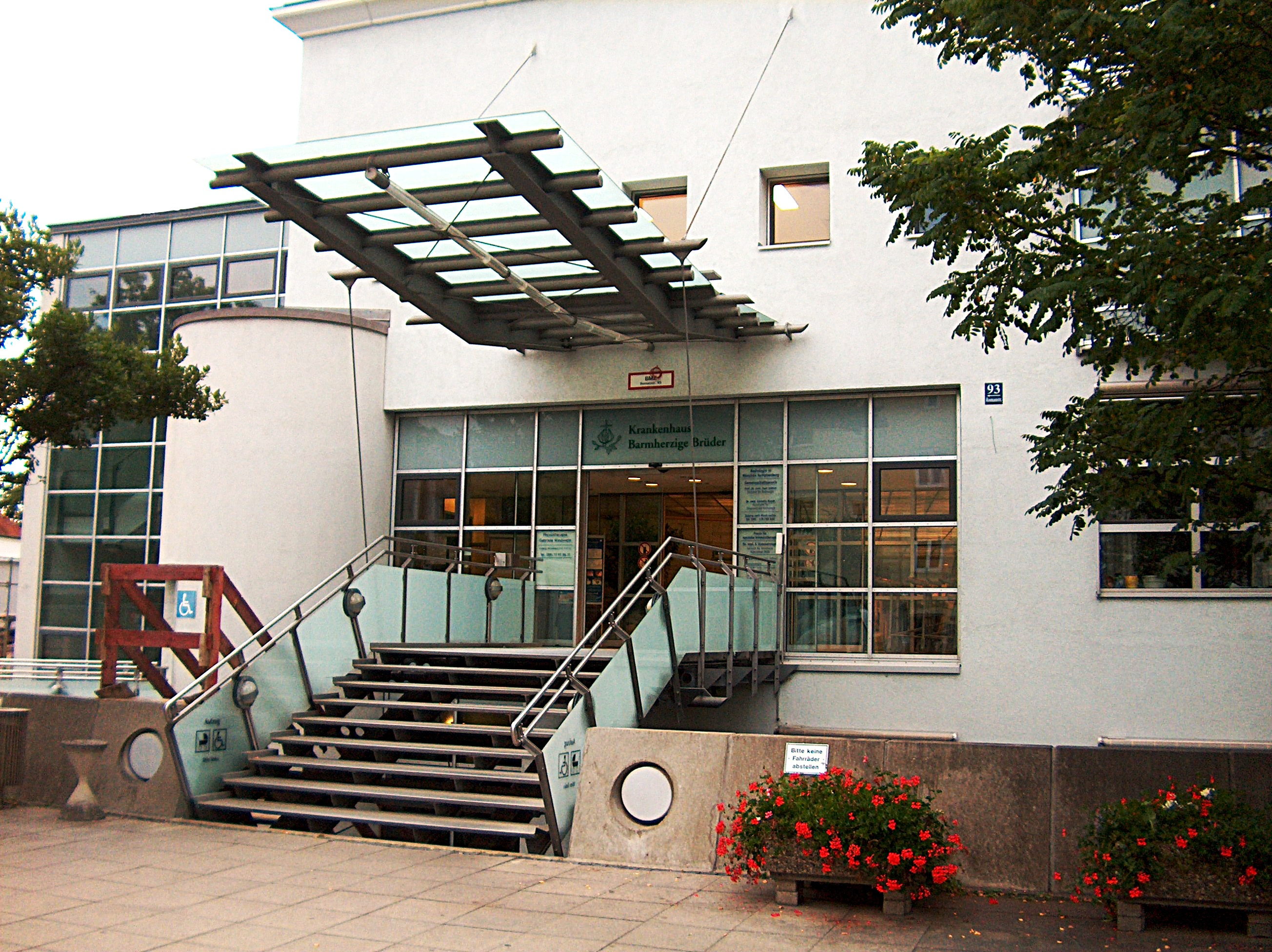 Das Krankenhaus Barmherzige Brüder in München.